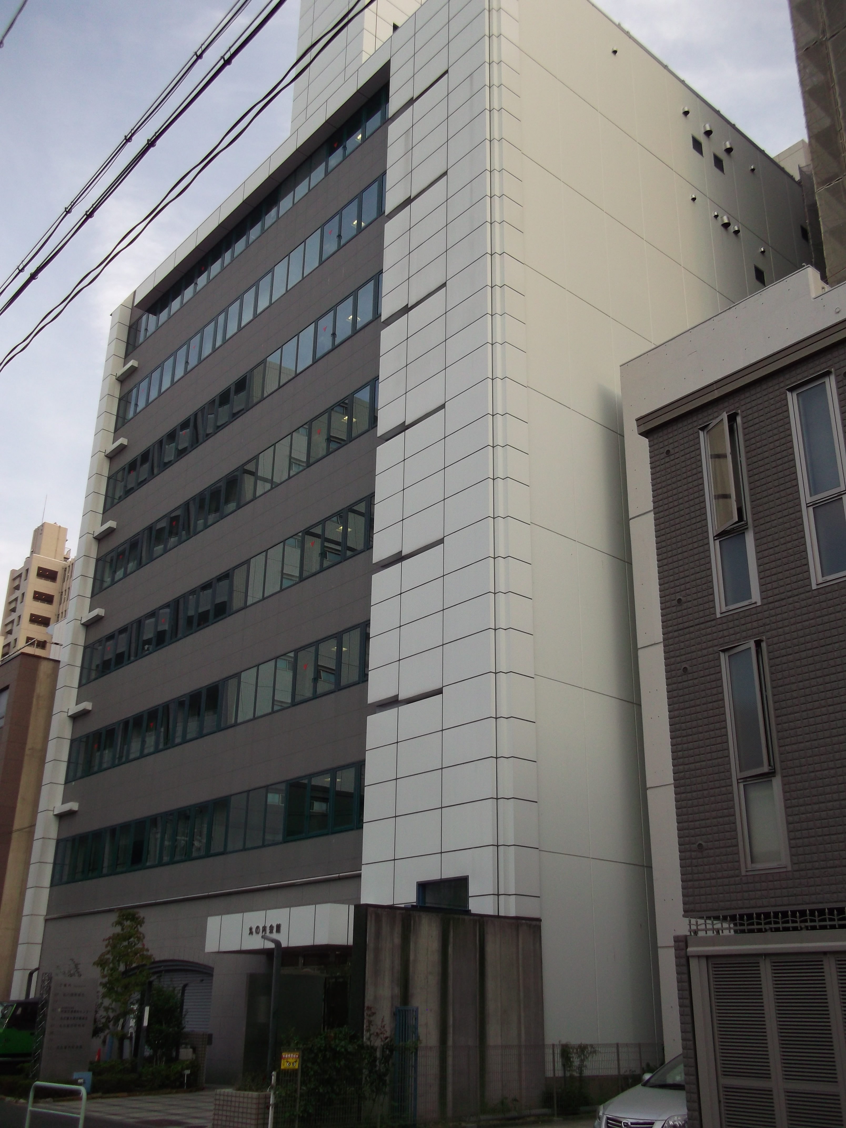 名古屋市中区の丸の内会館を北側公道西側より撮影